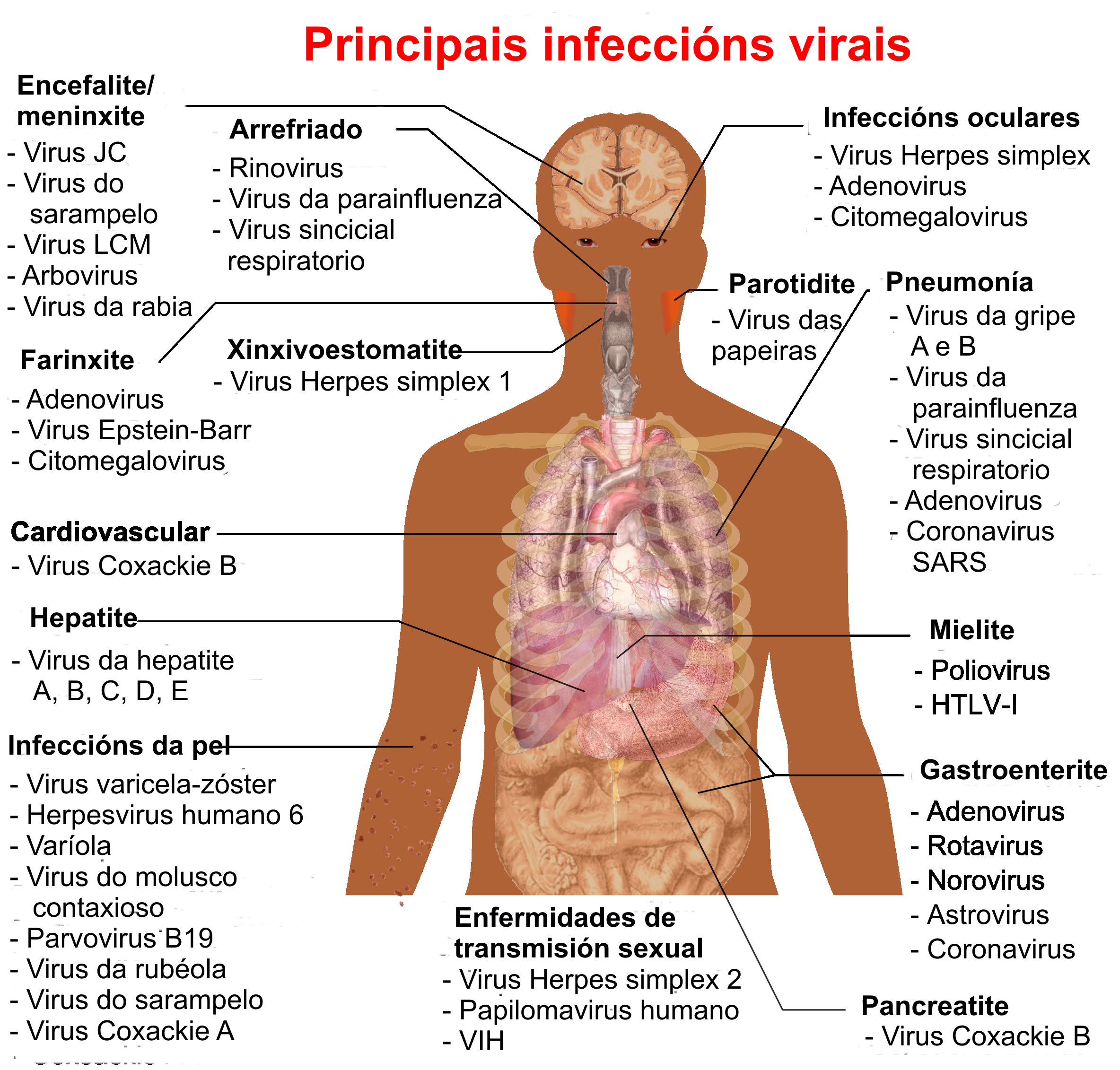 main viral diseases